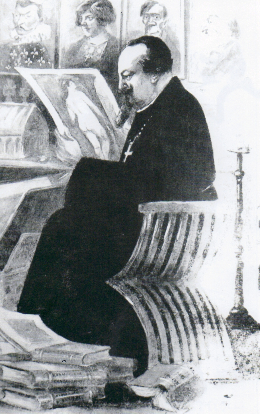 Alexandru Bogdan-Pitești. Caricatură din Albumul meu.